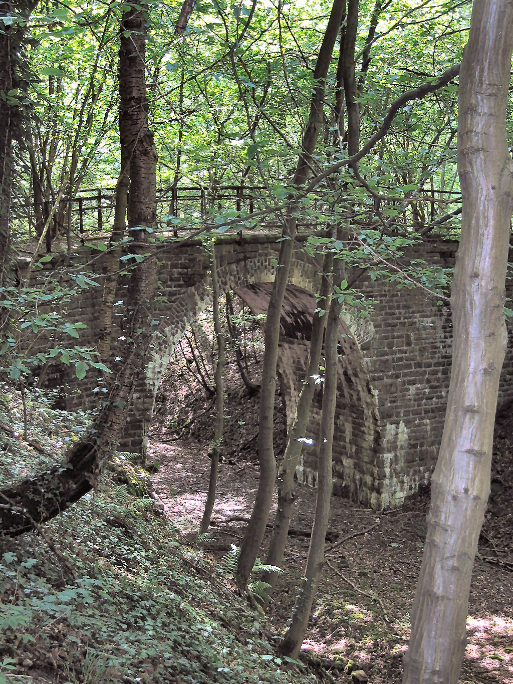 Brücke über die ehemalige Gleisanlage der Sülztalbahn (Köln–Lindlar) bei Kilometer 35,2 bei Klefhaus (Overath)